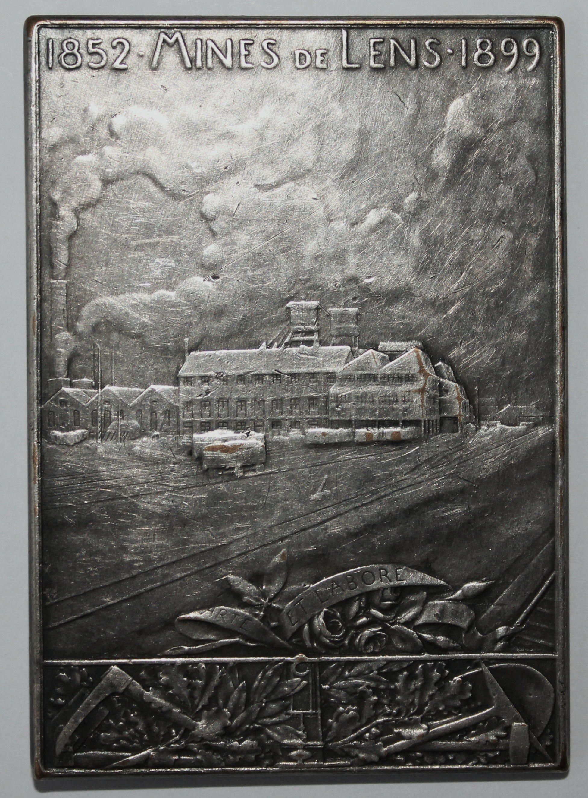 Plaquette des Mines de Lens (fosse 8) 1852 - 1899 ARTE ET LABORE gravée par Oscar Roty